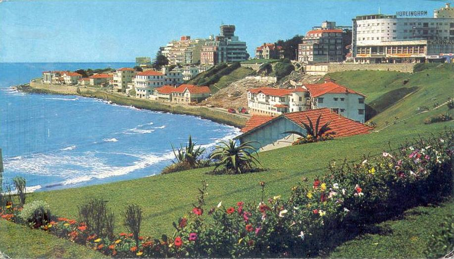 Vista de la entonces Playa de los Ingleses en Mar del Plata (hoy Playa Varese). Desaparecida por la erosión marítima en esos años, la playa tenía un conjunto de hoteles gremiales que fueron demolidos a partir de 1977 con vistas a la Copa Mundial de la FIFA Argentina 1978.